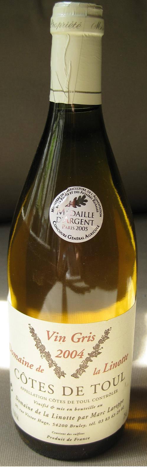 Bouteille de vin gris de Toul